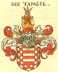 Wappen derer von Tangel